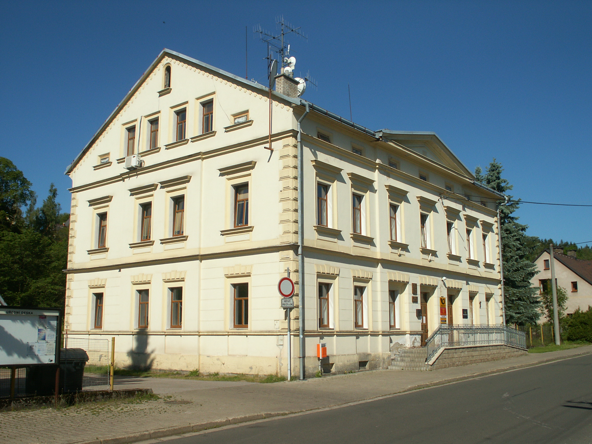 Mladé Buky - pošta + obecní úřad (č.p.186)